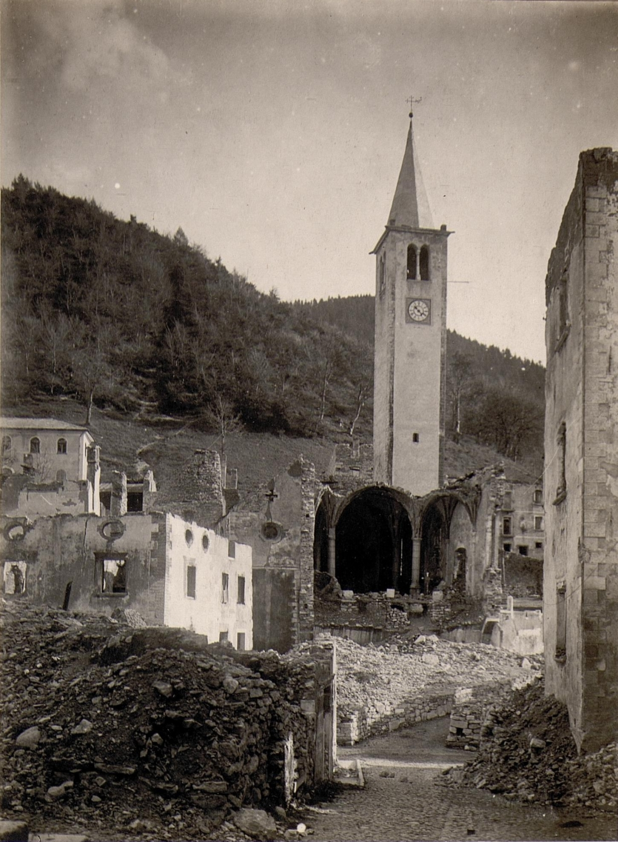 Castello Tesino.Zerstörte Kirche.